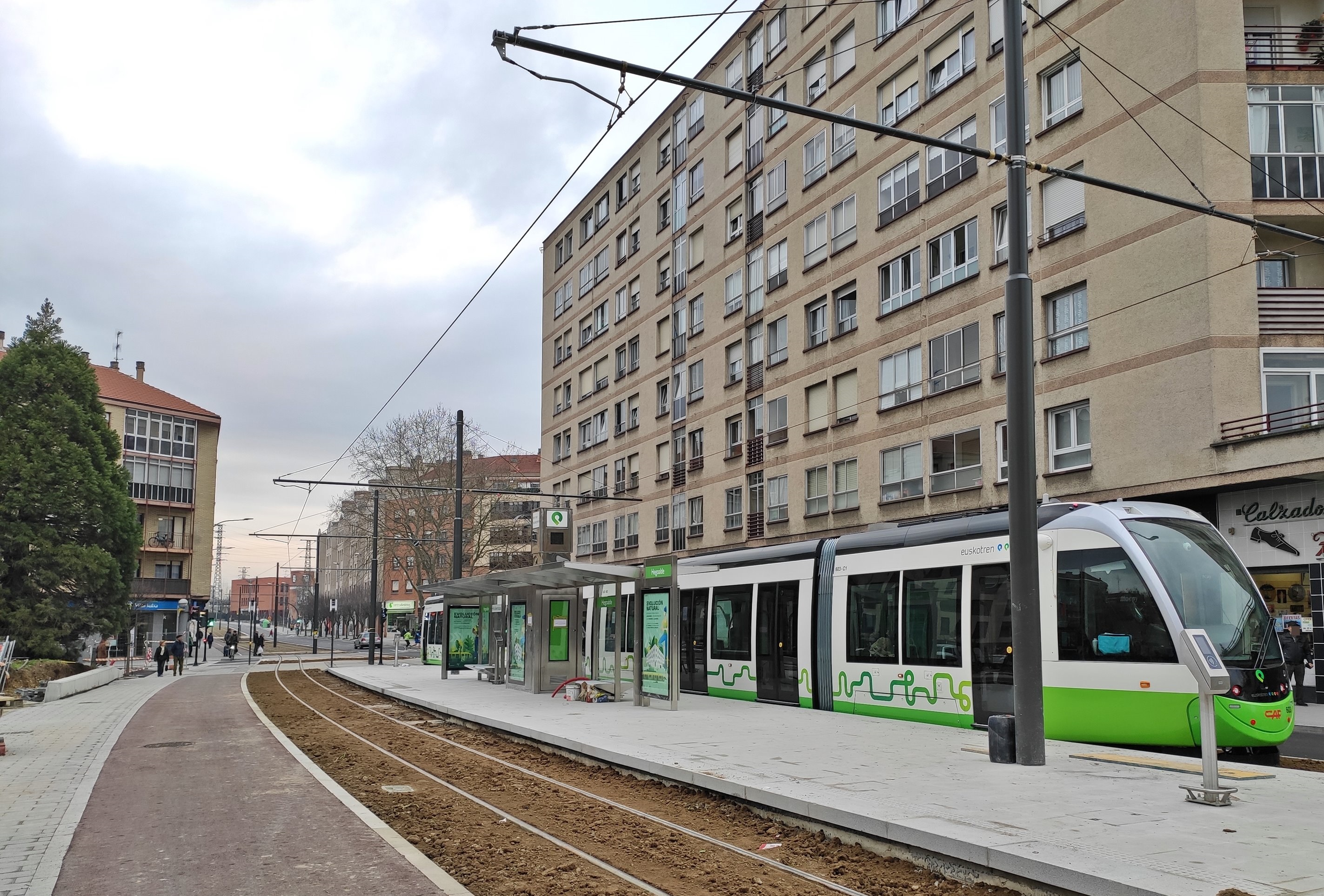 Parada de Hegoalde